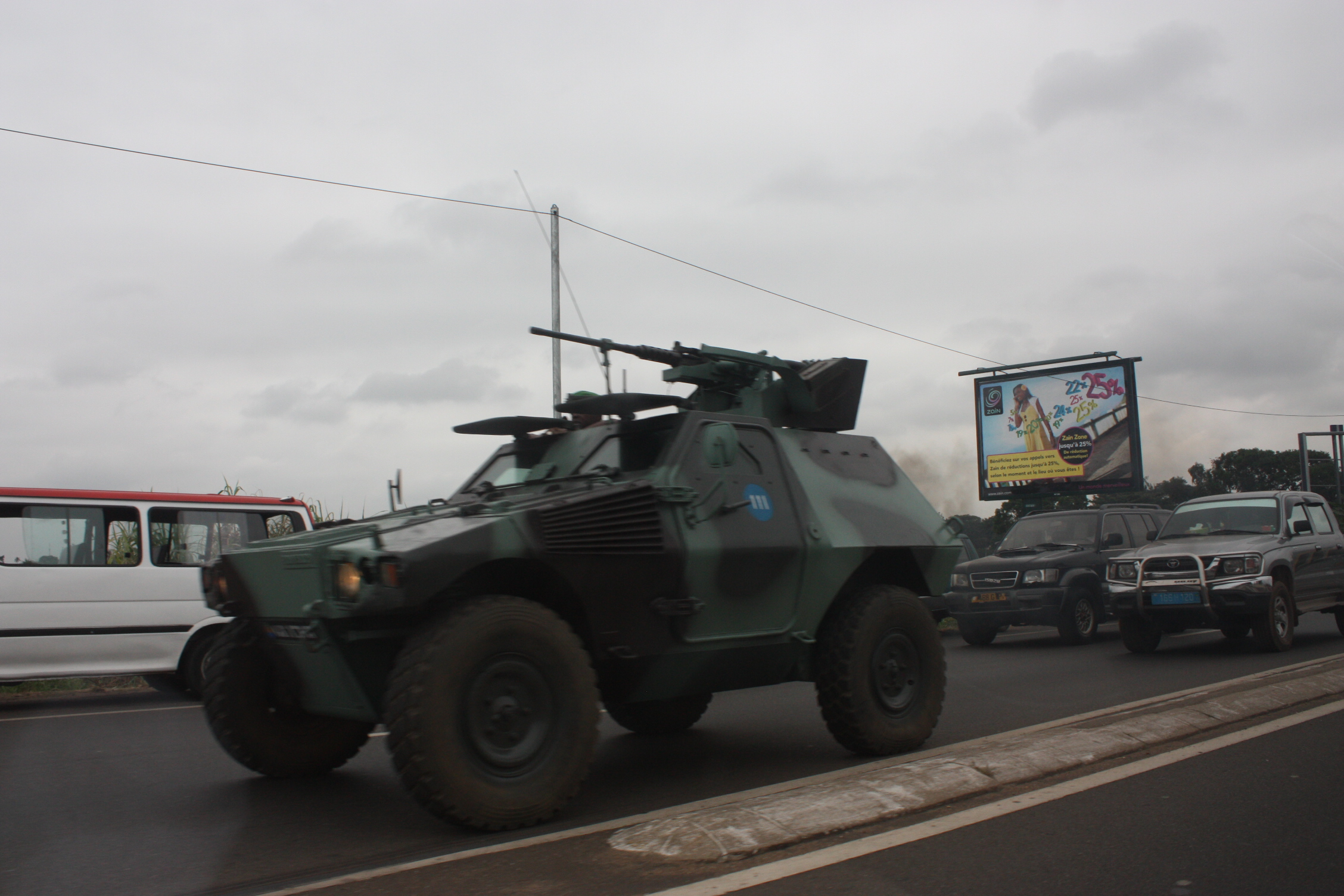 Les manifestations de vendredi 7 août à Libreville, Gabon. Plus d'infos sur